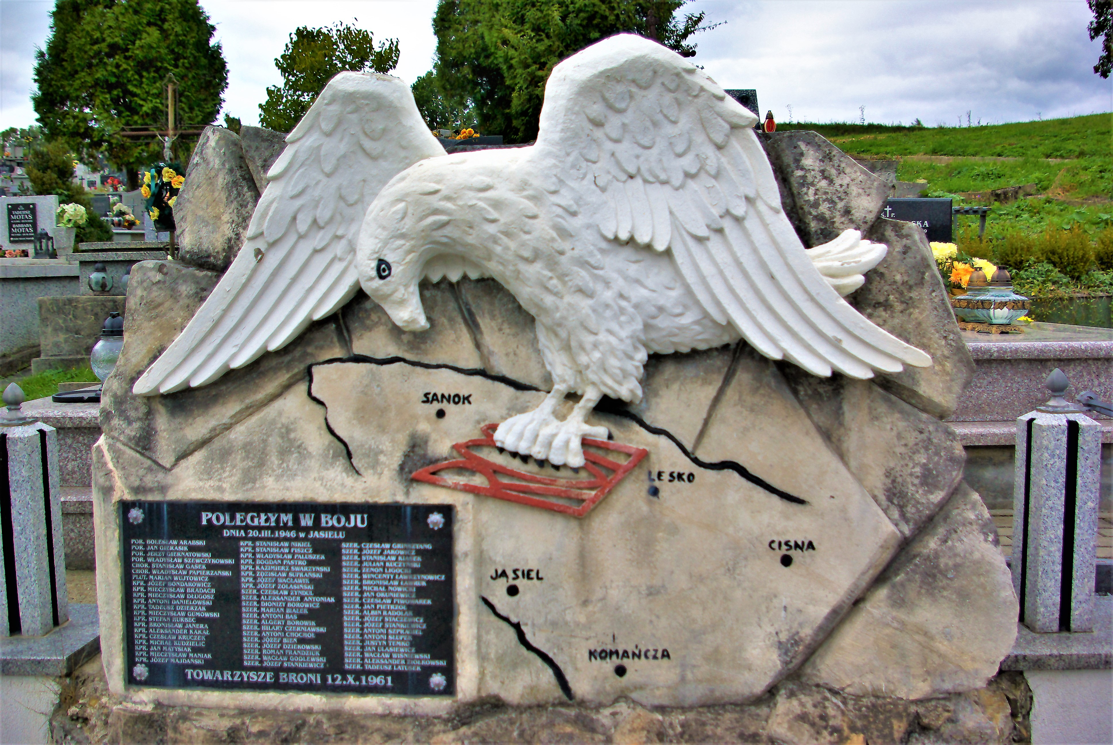 Pomnik pamięci polskich żołnierzy zamordowanych przez UPA 20 marca 1946 w Jasielu. Ustanowiony w 1961 na nowym cmentarzu w Zagórzu-Wielopolu